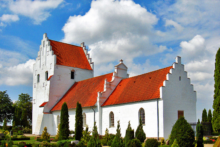 fra sydøst